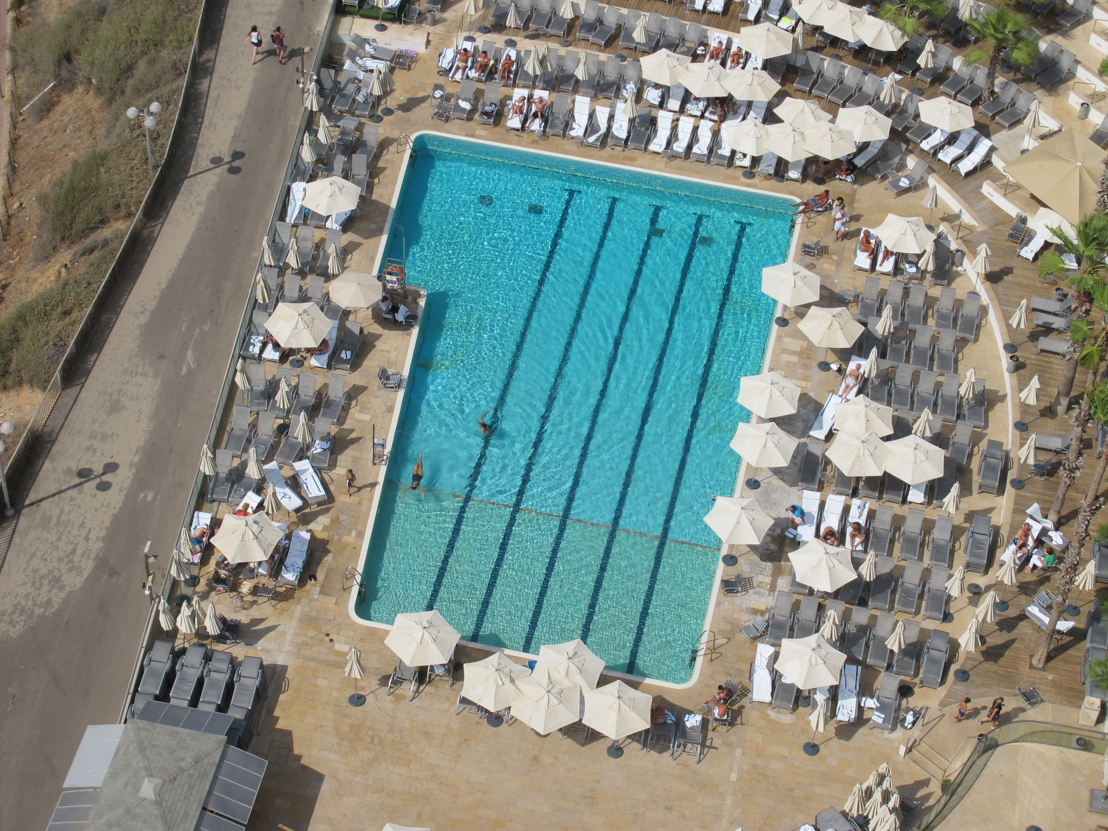 בריכת שחייה במלון הילטון תל אביב, 2013